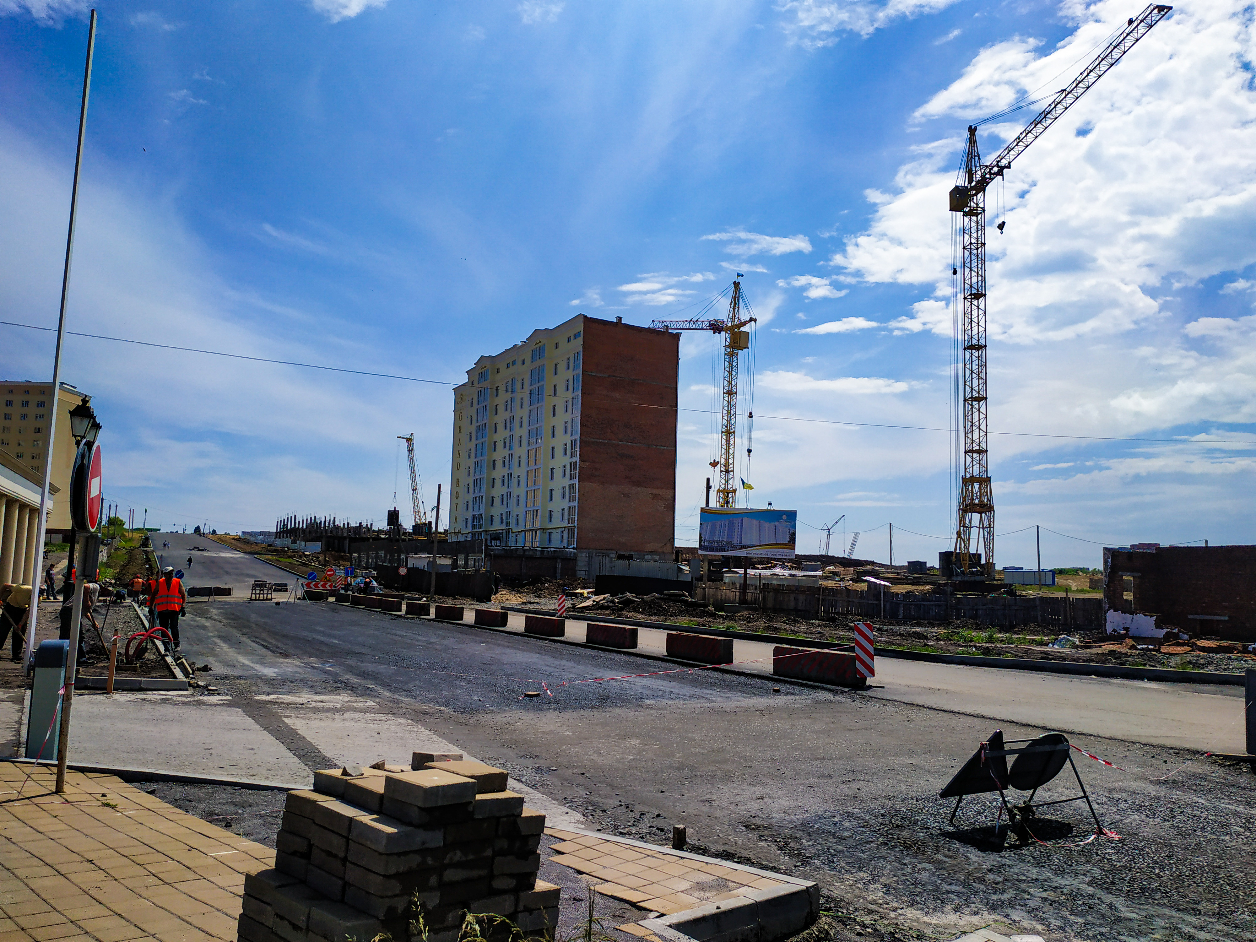 Прокладання вулиці Січових Стрільців у Озерній